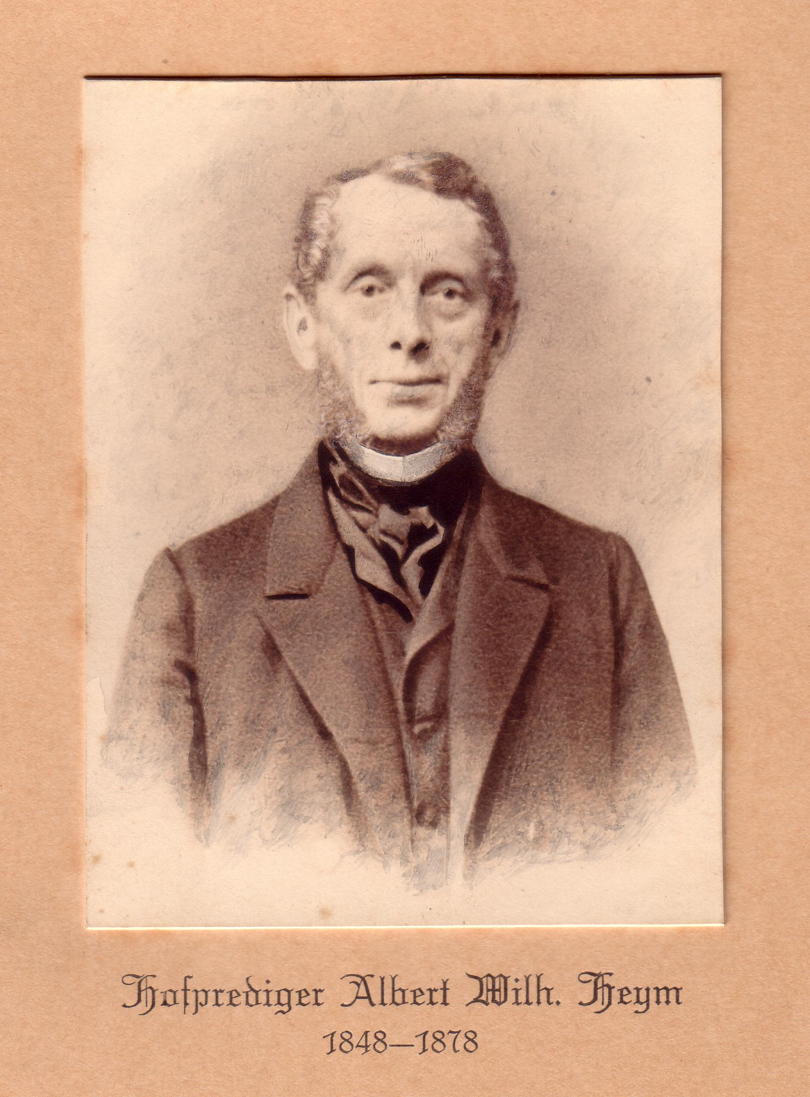 Scan einer Porträtfotografie des Potsdamer Hofpredigers Albert Wilhelm Heym (1808-1878)